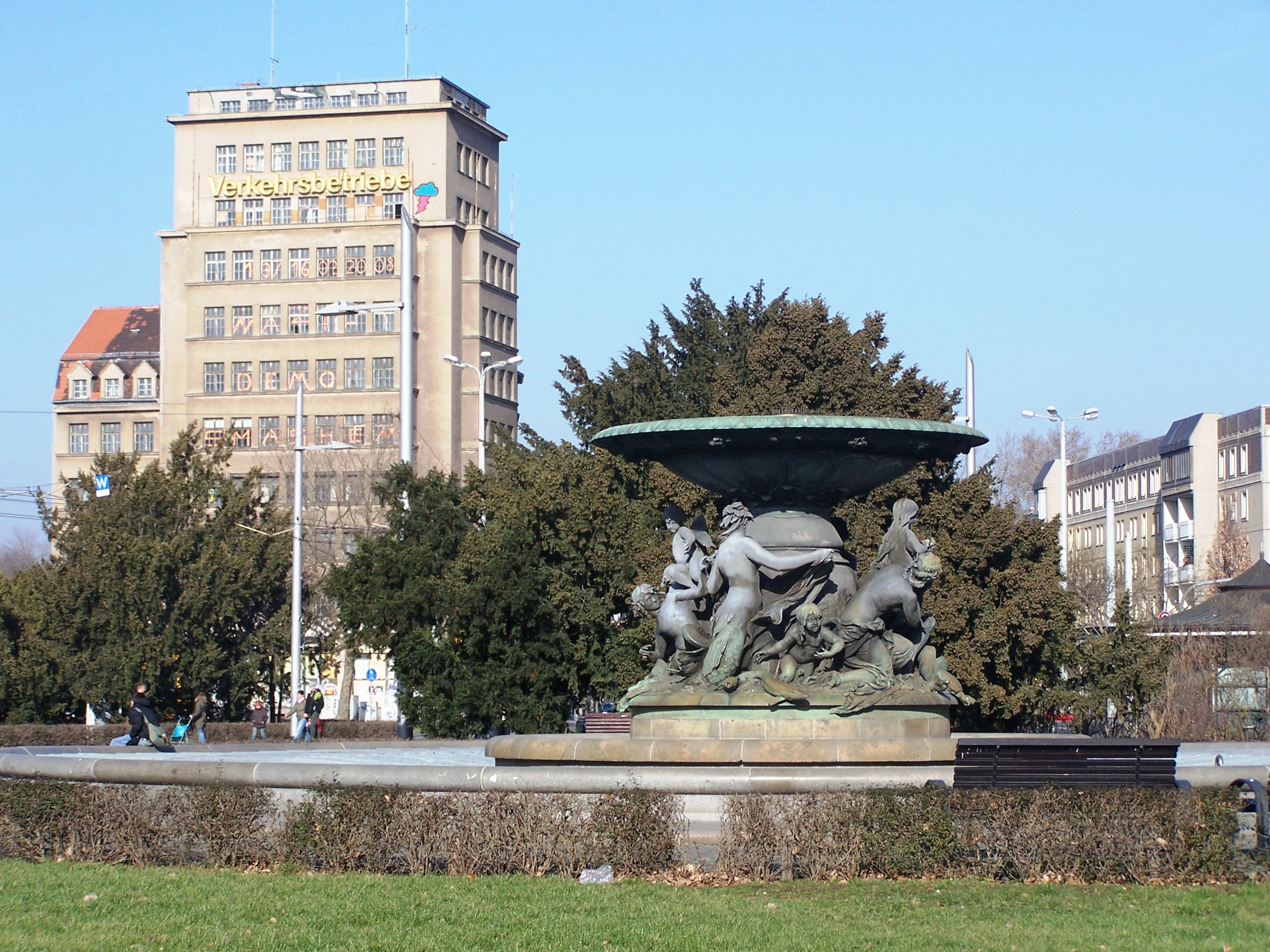 Dresden, Albertplatz. Brunnen von Robert Diez